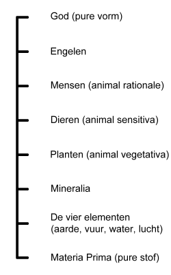 Deze afbeelding geeft de rangorde van zijnden weer, zoals opgesteld door de scholastici.